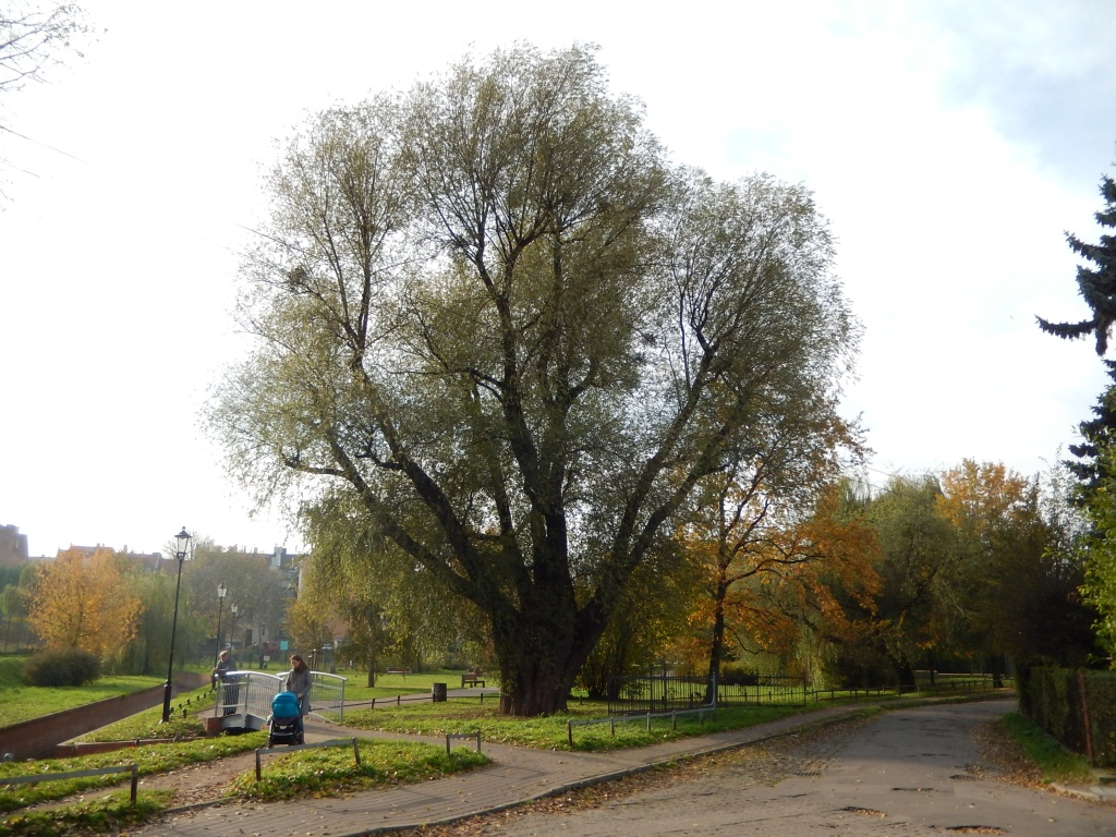 1050 Wierzba biała - pomnik przyrody - park nad Strzyżą w Gdańsku. Drzewo w 2014 posiadało obwód 794 cm.